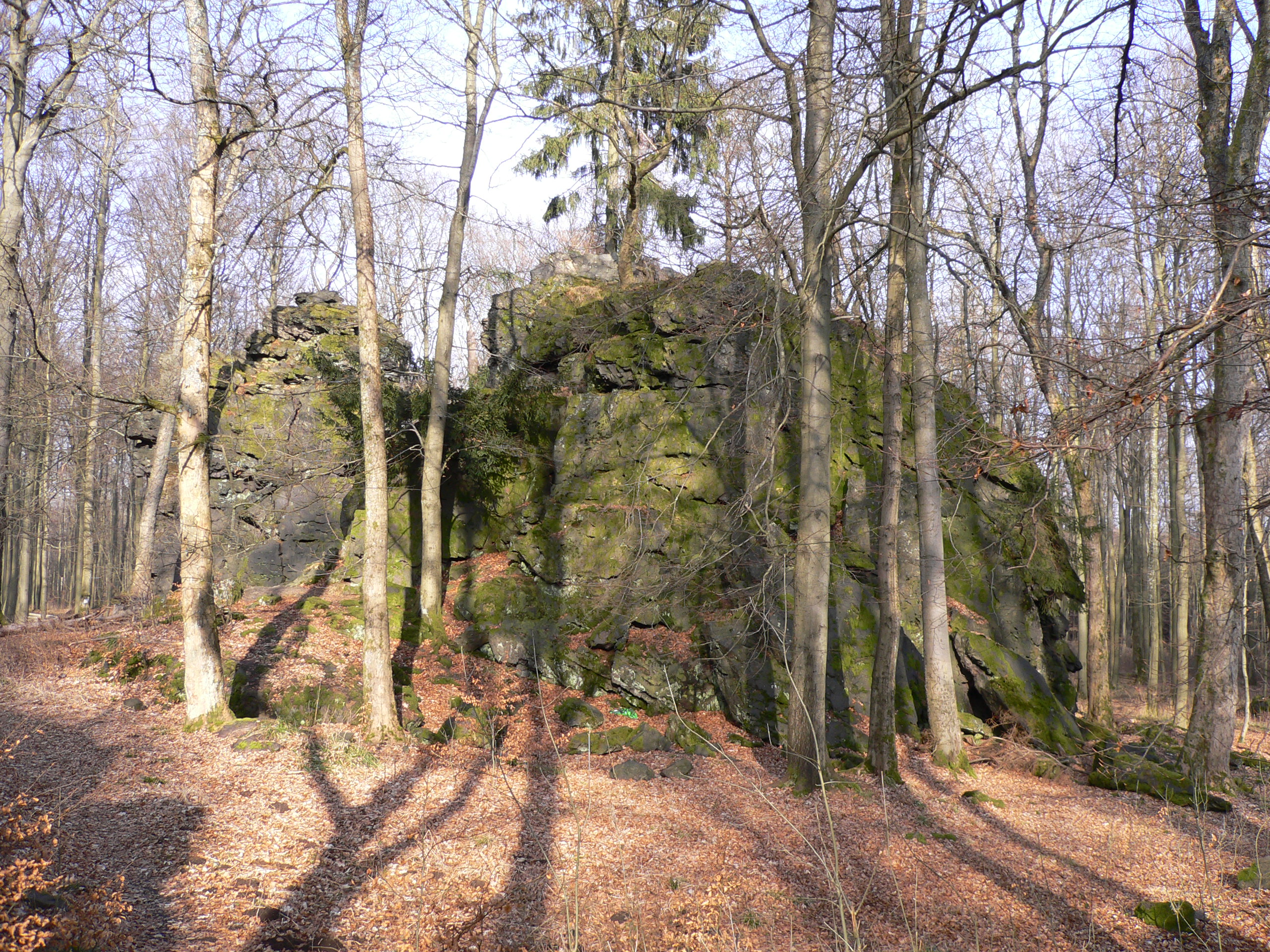 Wilhelmsteine: Die beiden größten Felsen aus Süd-West gesehen